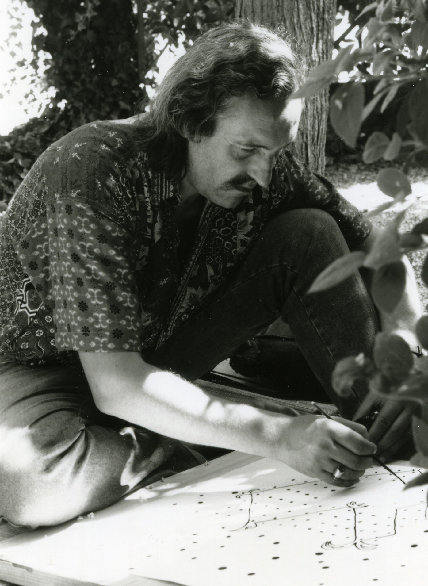 Le peintre algérien Denis Martinez, 1990